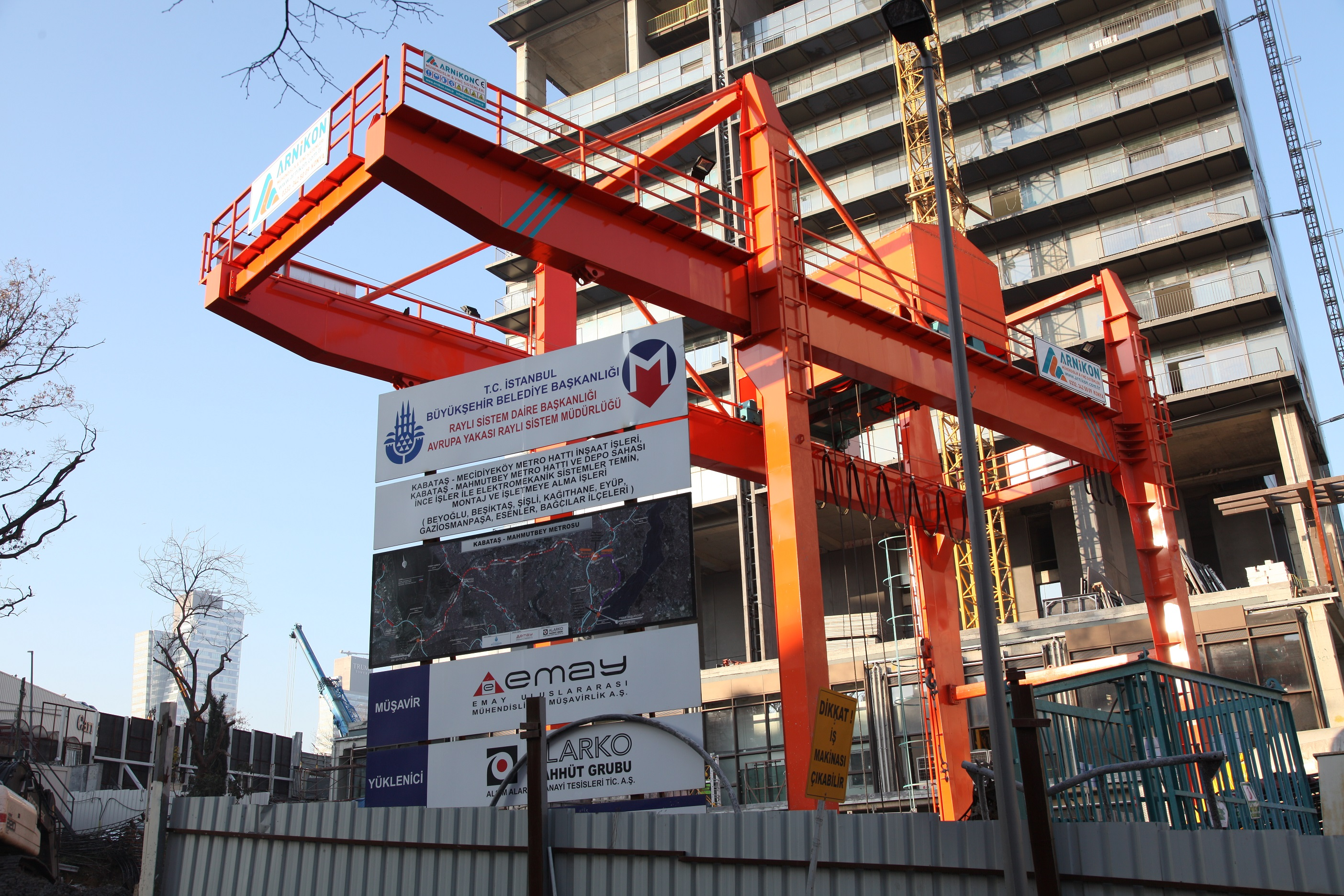 رافعة جسرية كهربائية متجولة في تركيا تم تركيبها بواسطة شركة ارنيكون